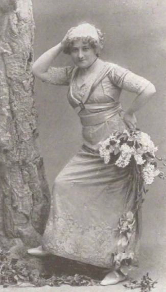 La actriz María Guerrero en la obra de teatro La flor de la vida, de los Hermanos Álvarez Quintero